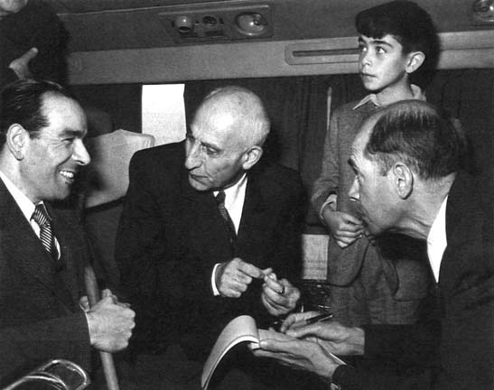 دکتر محمد مصدق در کنار دکتر حسین فاطمی